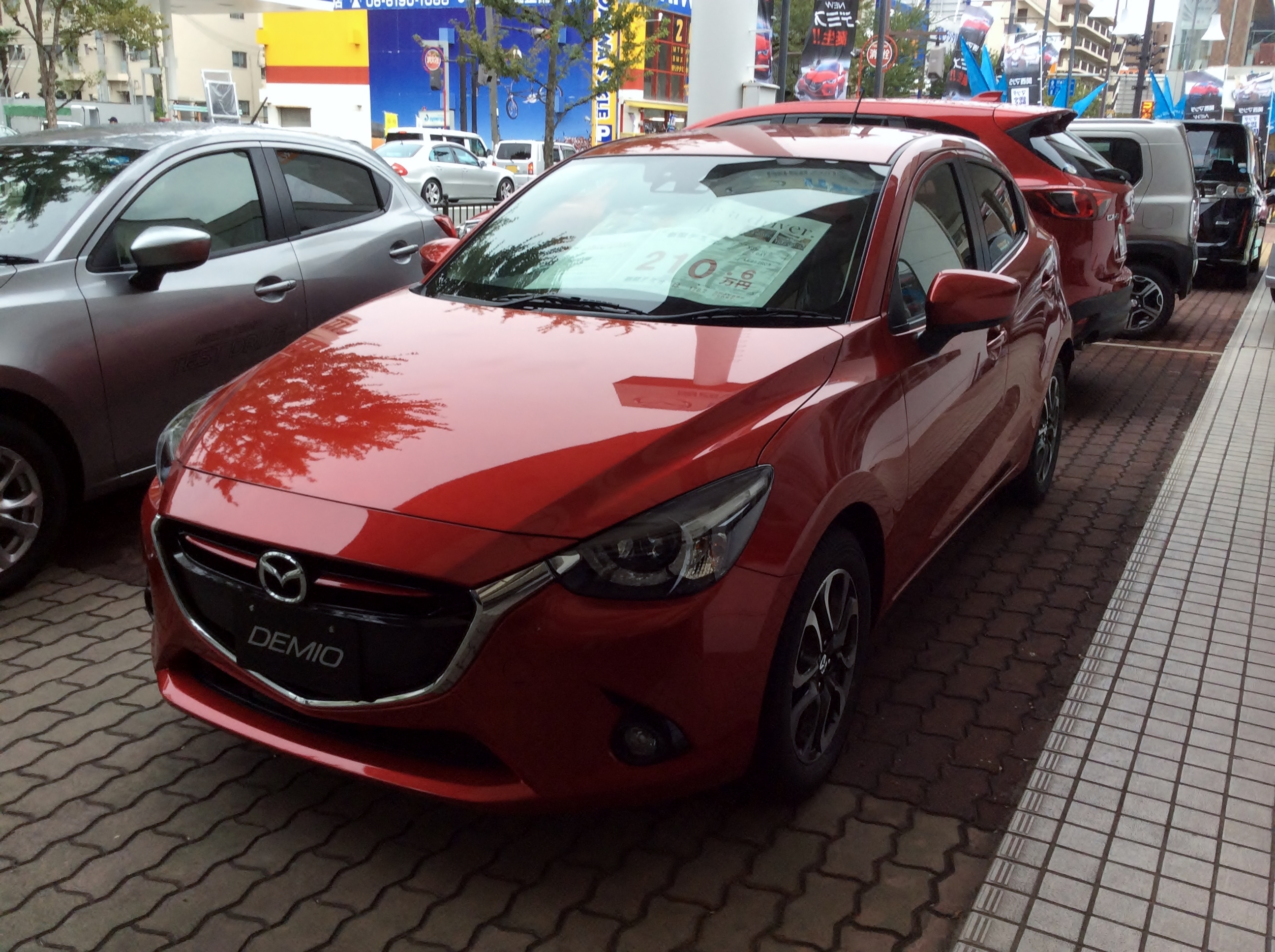 DJ型マツダ・デミオXDツーリングLパッケージをフロントから撮影。